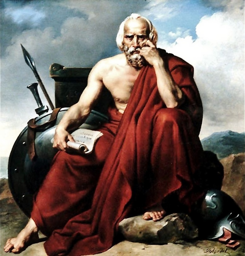 Lycurgus of Sparta.label QS:Len,"Lycurgus of Sparta." label QS:Lde,"Lycurgus von Sparta" label QS:Lit,"Licurgo di Sparta."